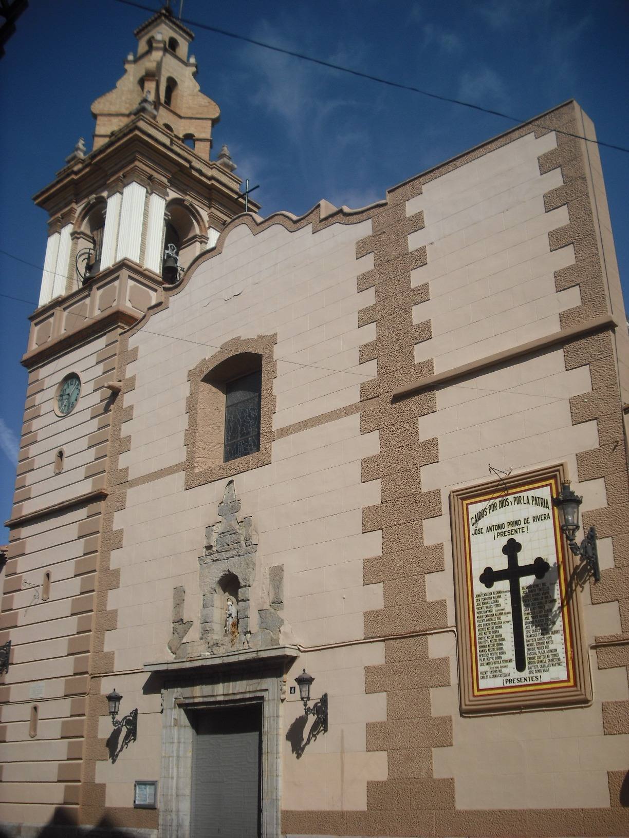 Església de Sant Antoni.